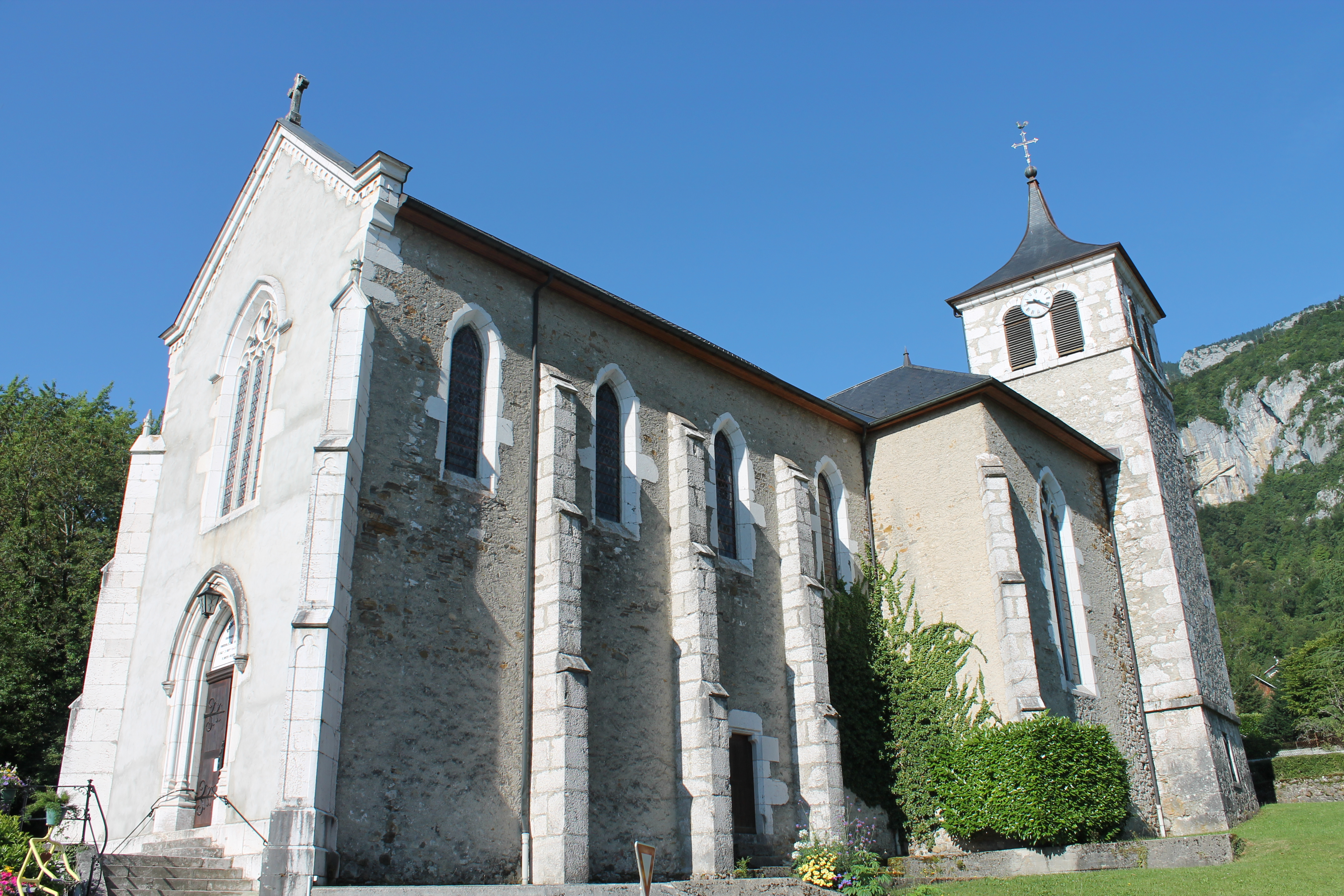 Église Saint-Ours de Lathuile. Construite selon les plans de l'architecte des Bâtiments du département et architecte diocésain, Joseph Samuel Revel, en 1863